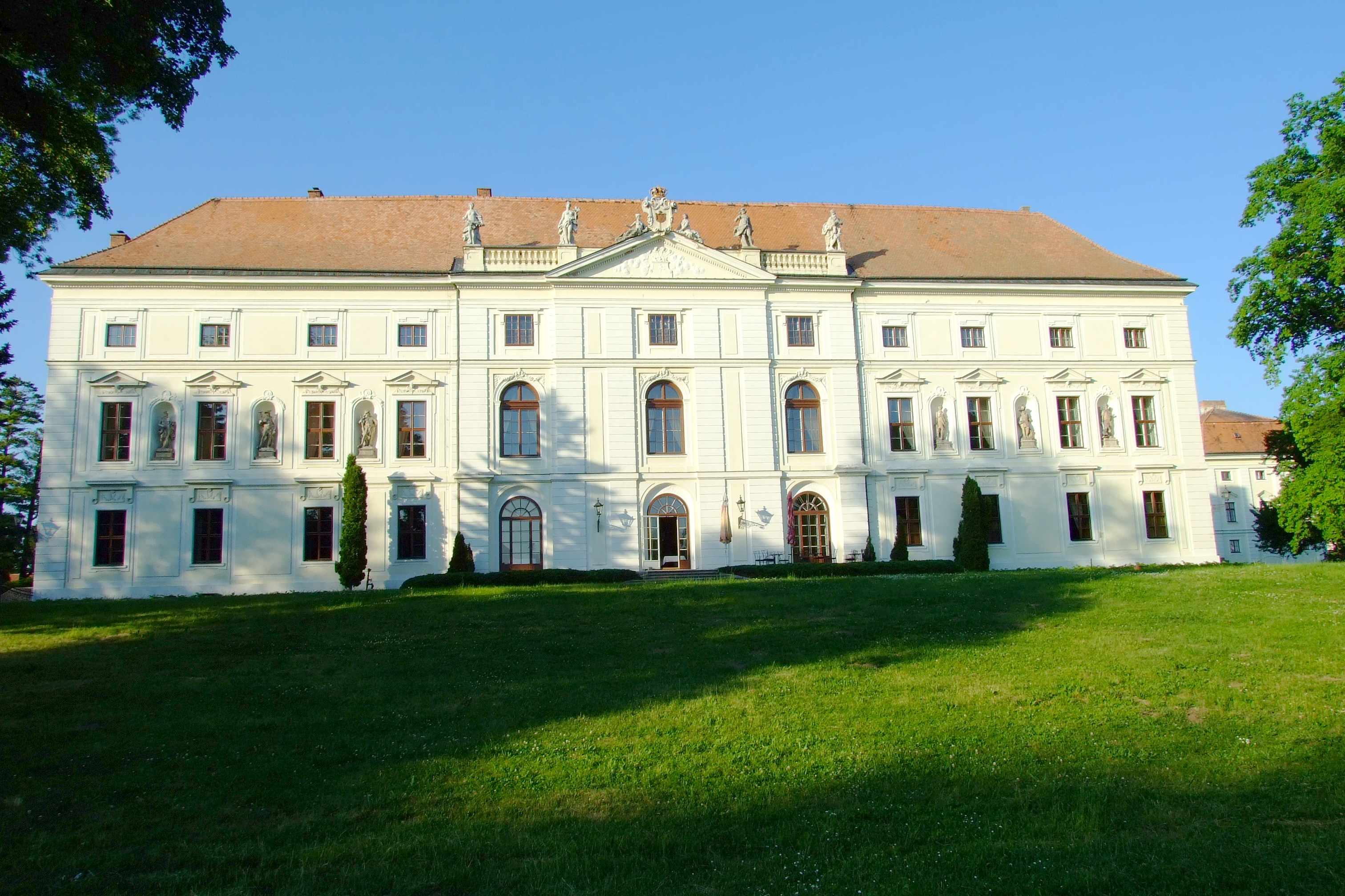 Židlochovice - zámek, vyfotografovaný od jihozápadu